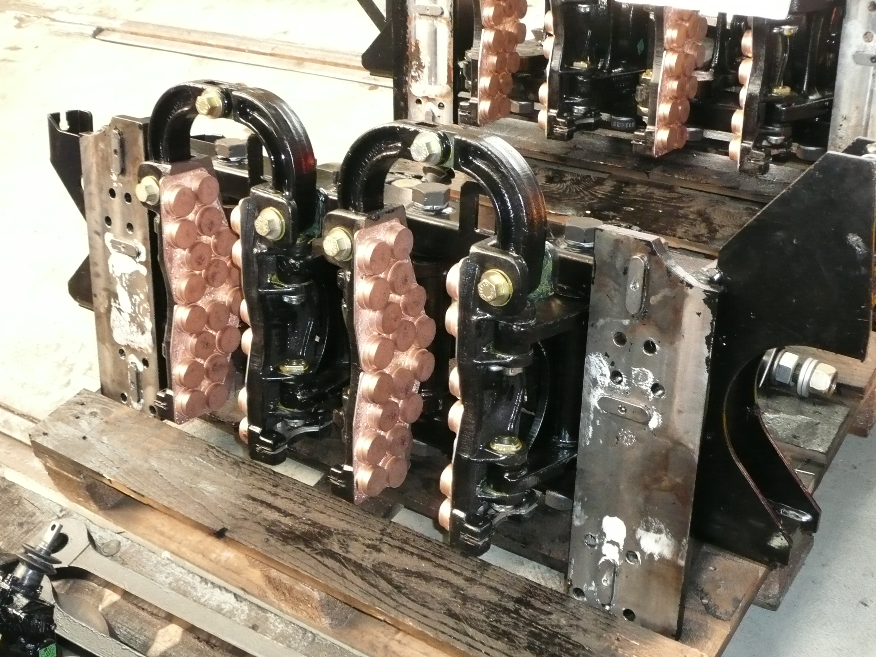 Doppelbremsgestänge für die Bremswelle der BR 182 im AW Dessau